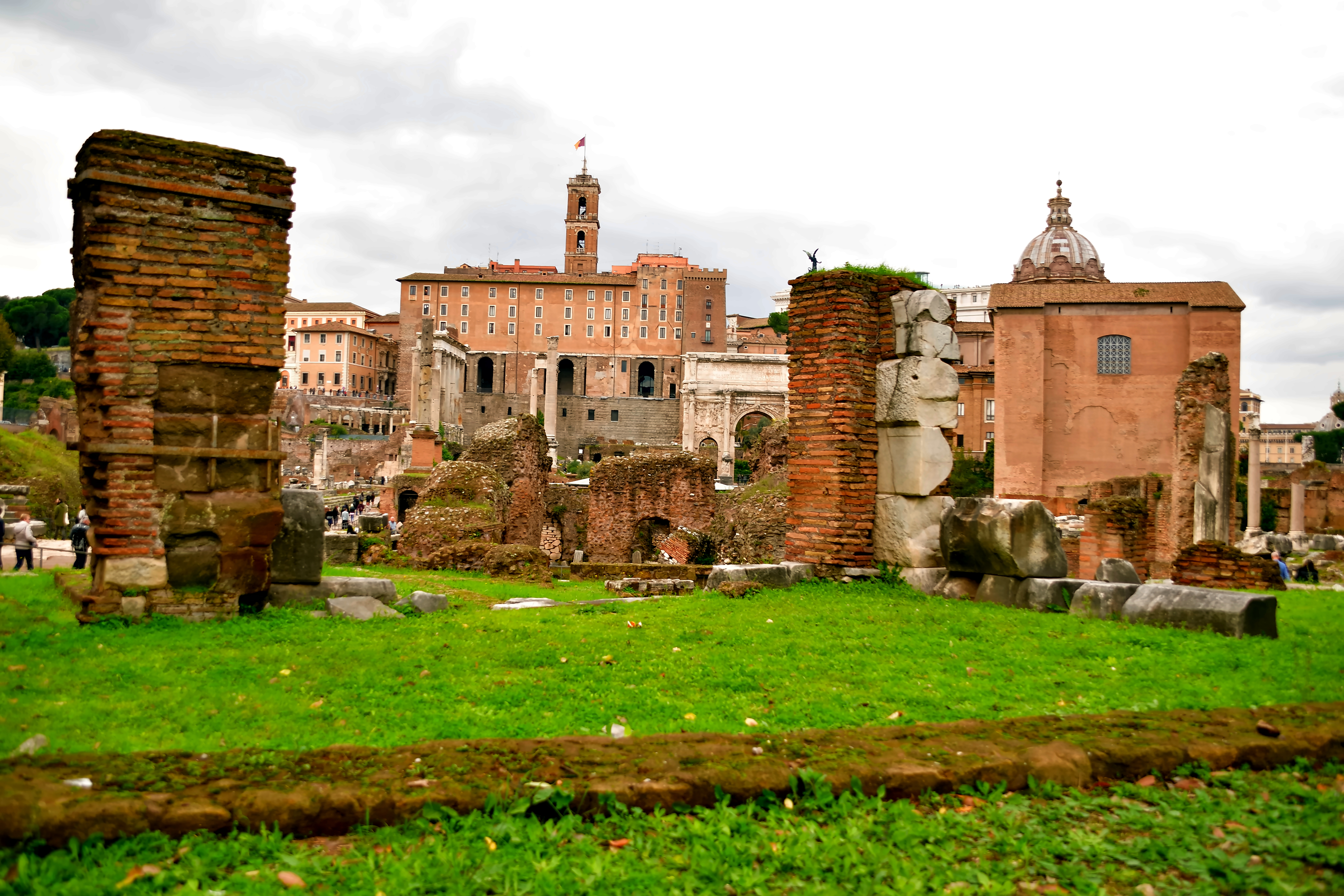 Gelände der Regia mit Fragmenten auf dem Forum Romanum